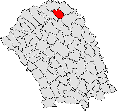 Categorie:Hărţi ale judeţului Botoşani